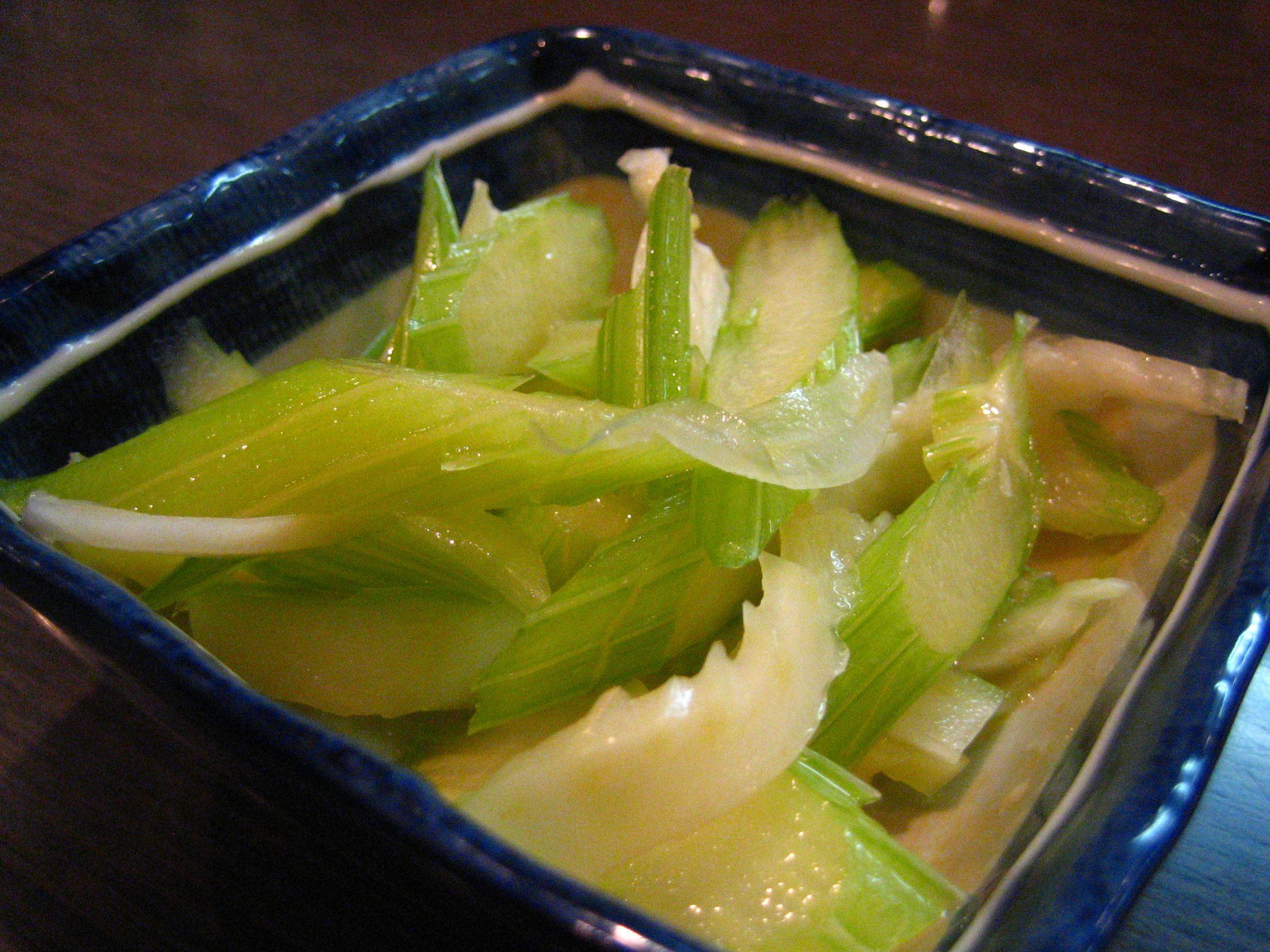 at Beni-ton, in Kayaba-cho, Tokyoセロリの浅漬け